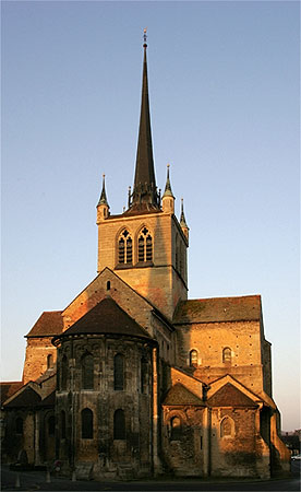 Payerne: Abbatiale (Abteikirche) - 11. Jahrhundert